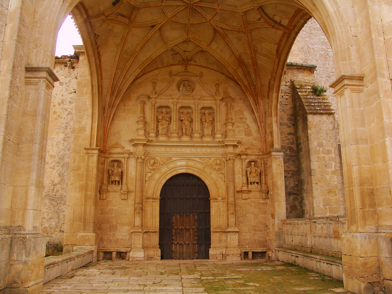 Pórtico iglesia Bisjueces, Jueces de Castilla, Merindades, provincia de Burgos, España.